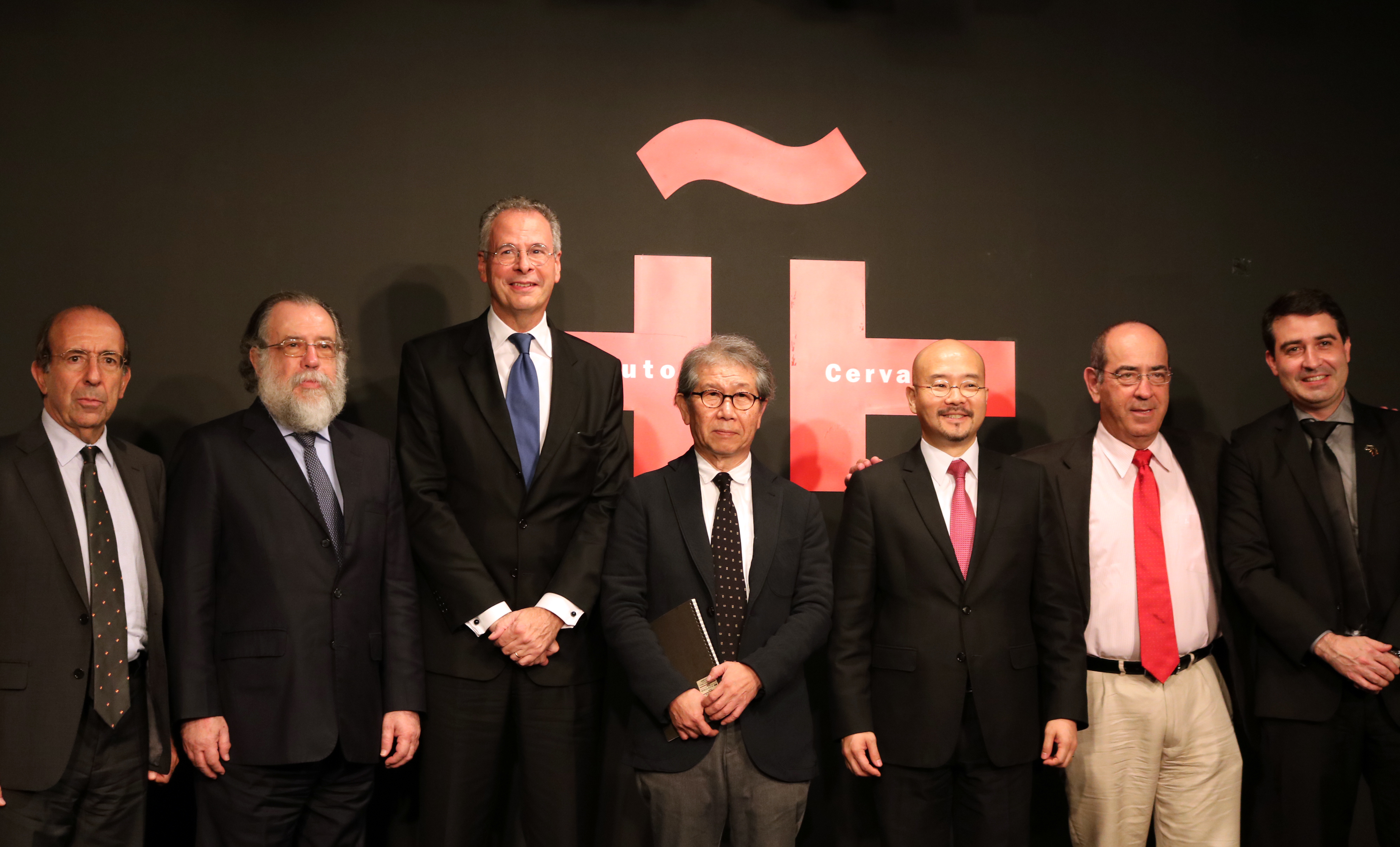 (De izquierda a derecha) Gonzalo de Benito, Embajador de España en Japón, Leonardo Carrión Eguiguren, Embajador de Ecuador en Japón, André Corrêa do Lago, Embajador de Brasil en Japón, Riken Yamamoto, arquitecto, Seiko Luis Ishikawa, Embajador de Venezuela en Japón, Antonio Gil de Carrasco, director del Instituto Cervantes de Tokio, y Alejandro Posada, Encargador de negocio de la Embajada de Colombia en Japón.